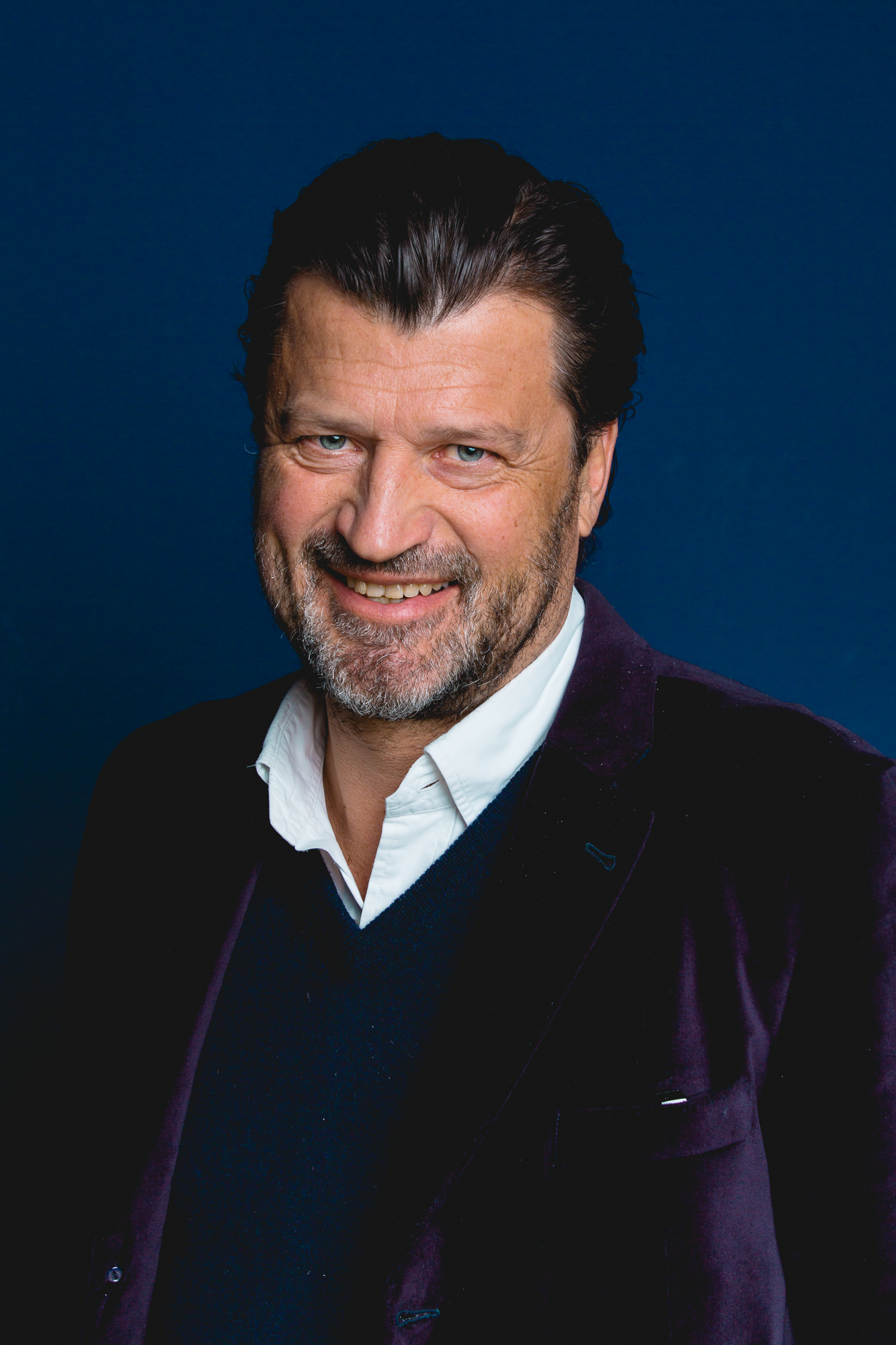 Portraitfoto von Martin Rohla